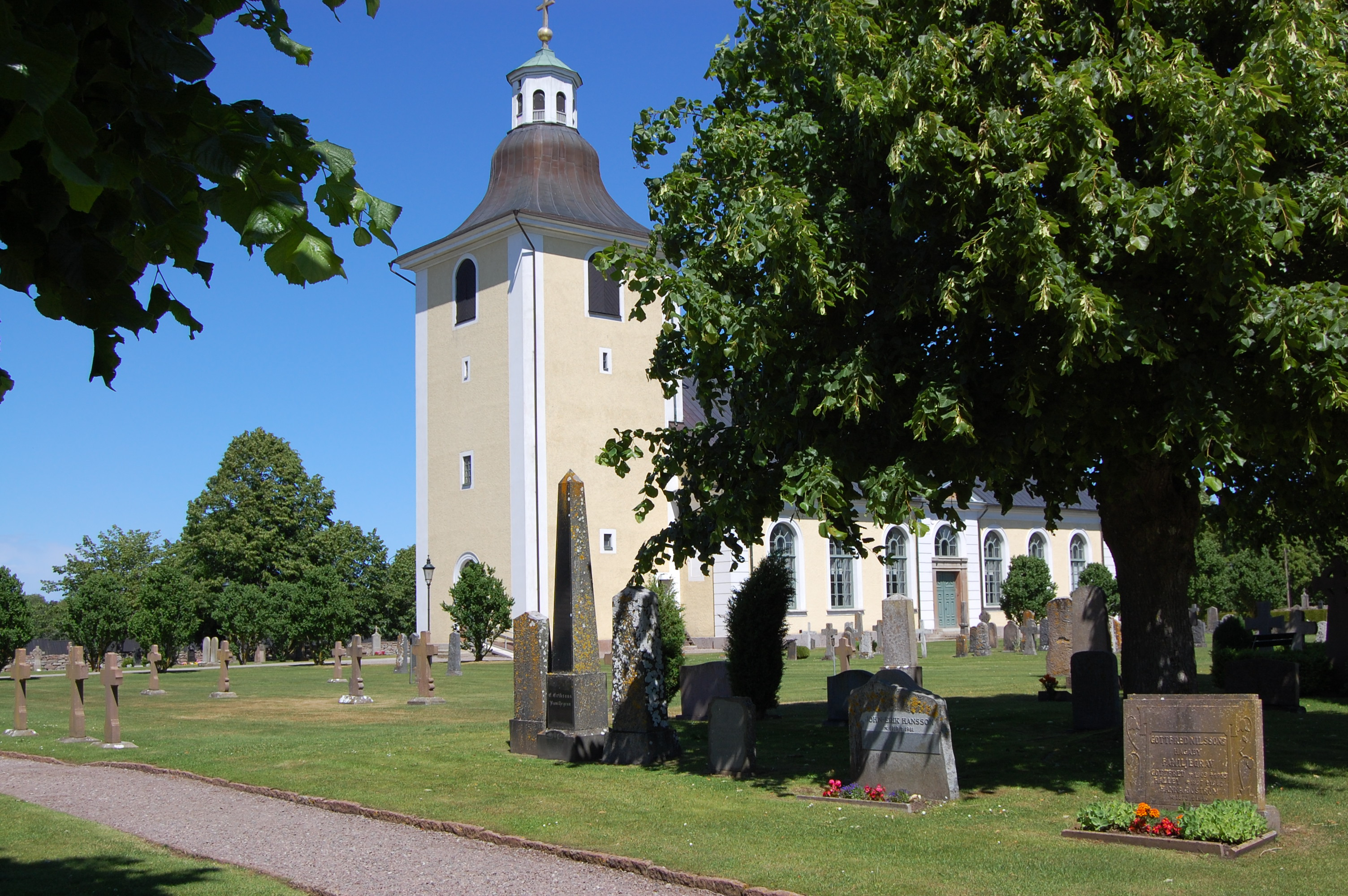 Högby kyrka från sydväst.